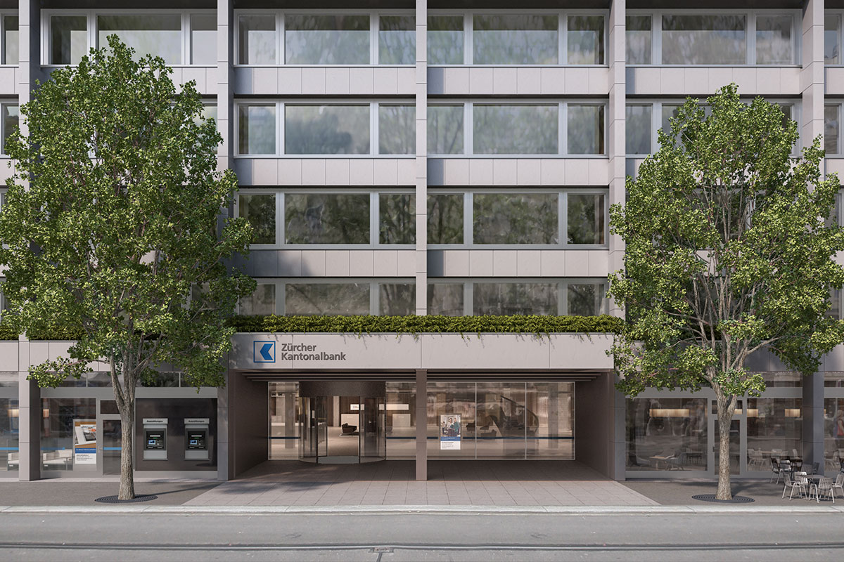 Renovierter Hauptsitz, aktuellstes Bild.